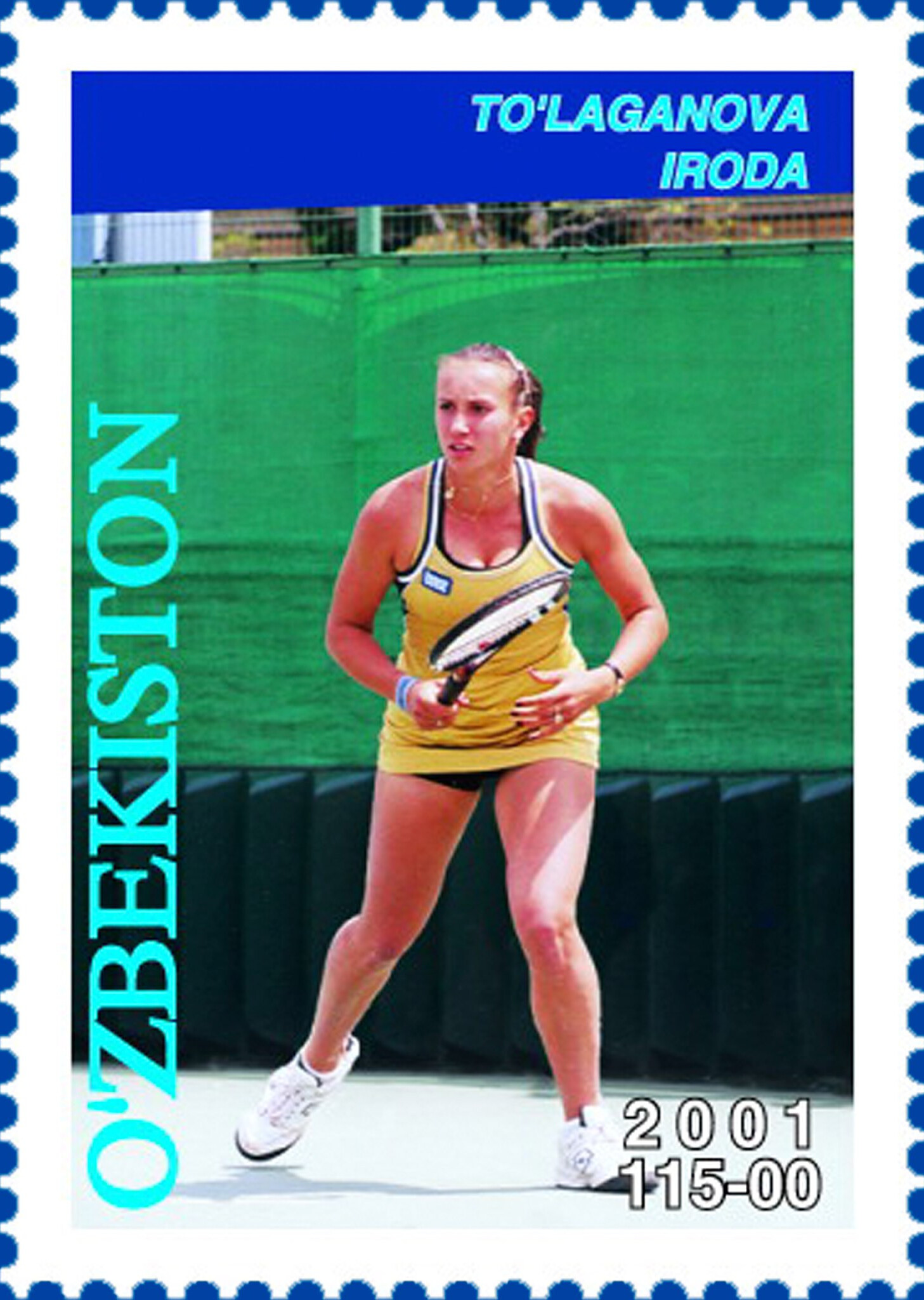 Iroda Tulyaganova